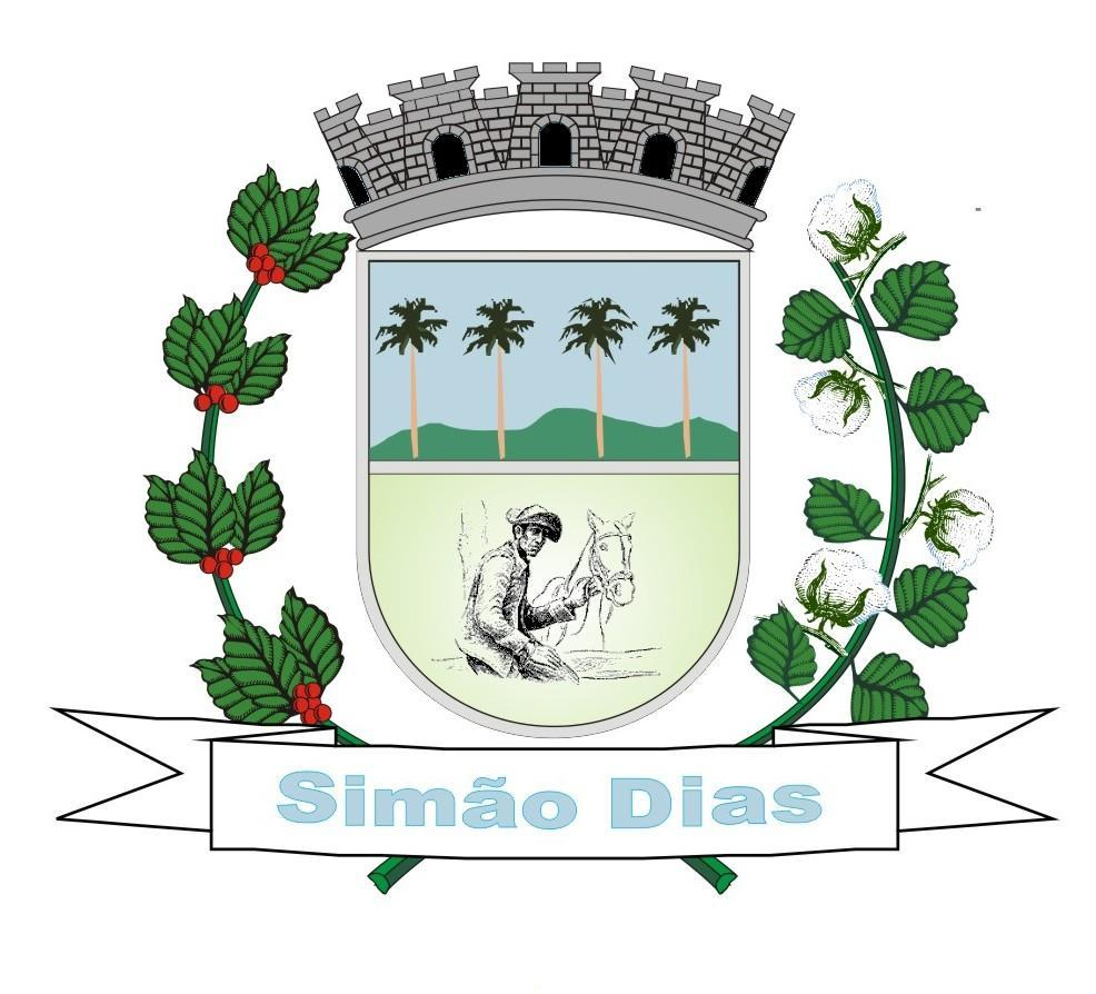 Prefeitura de Simão Dias